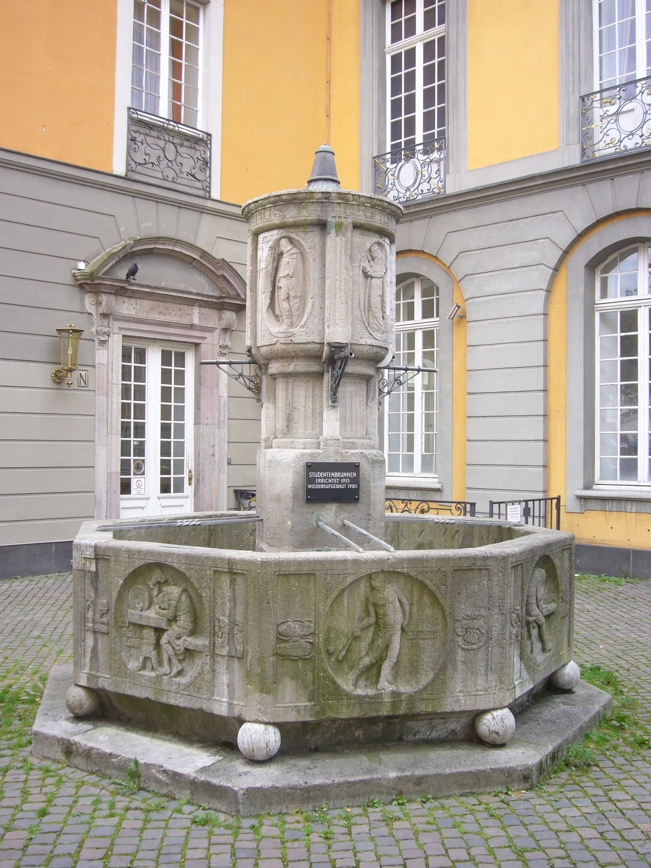 Der sog. Studentenbrunnen von 1913 (Nr. A1305 der Bonner Denkmalliste). Im Hintergrund das Hauptgebäude der Universität Bonn (Nr. A179). Inschrift oben: Gaudeamus igitur, iuvenis dum sumus.